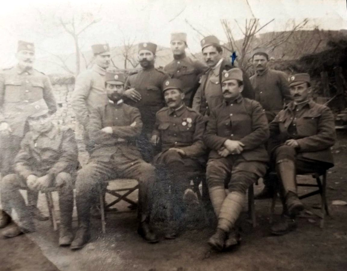 Јован Цакић са својим саборцима